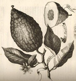 האתרוג עם פיטמה קיימת - The Citron with persisting carpel